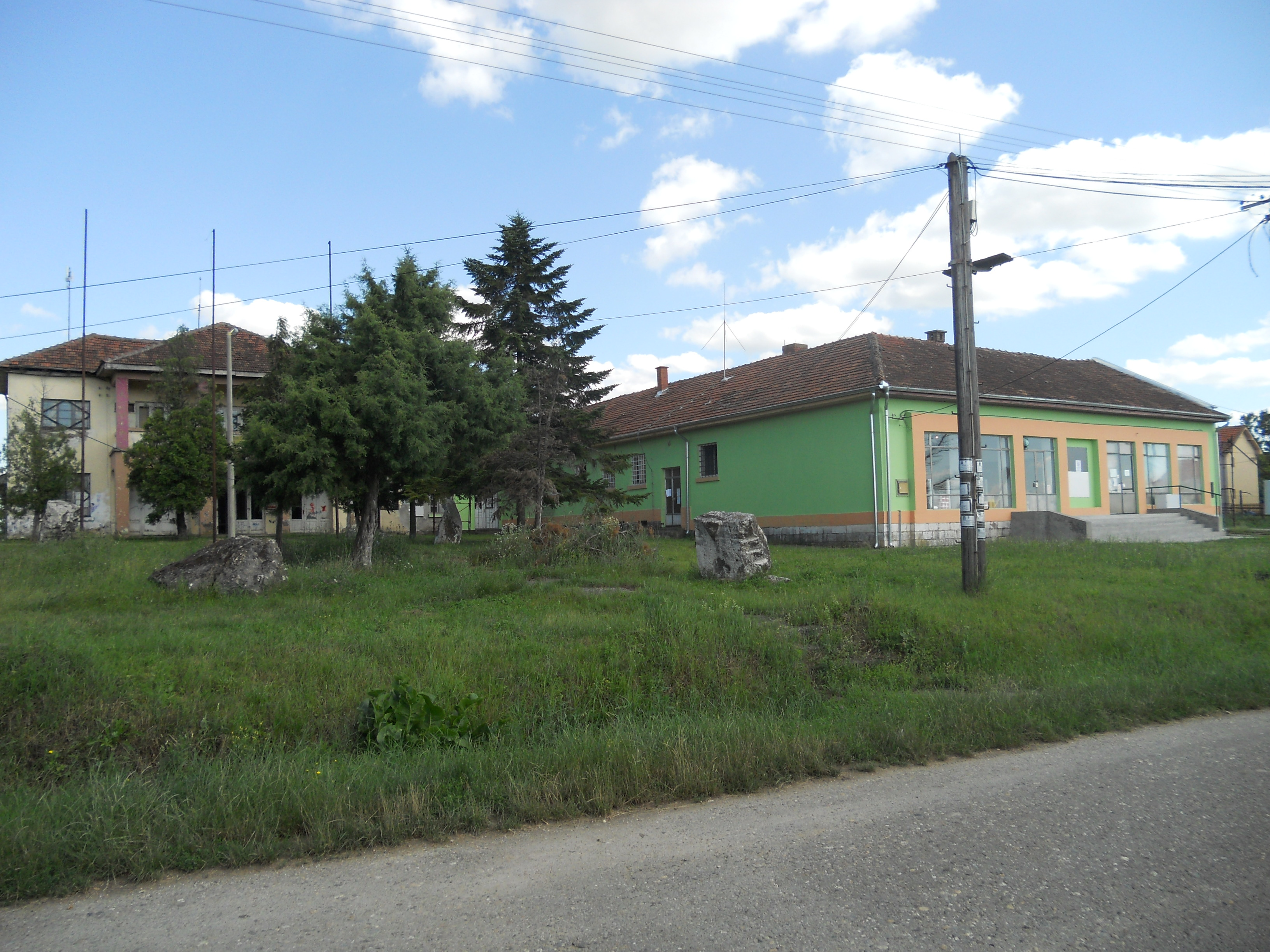 Jalovik,dom kulture i prodavnica Licensing